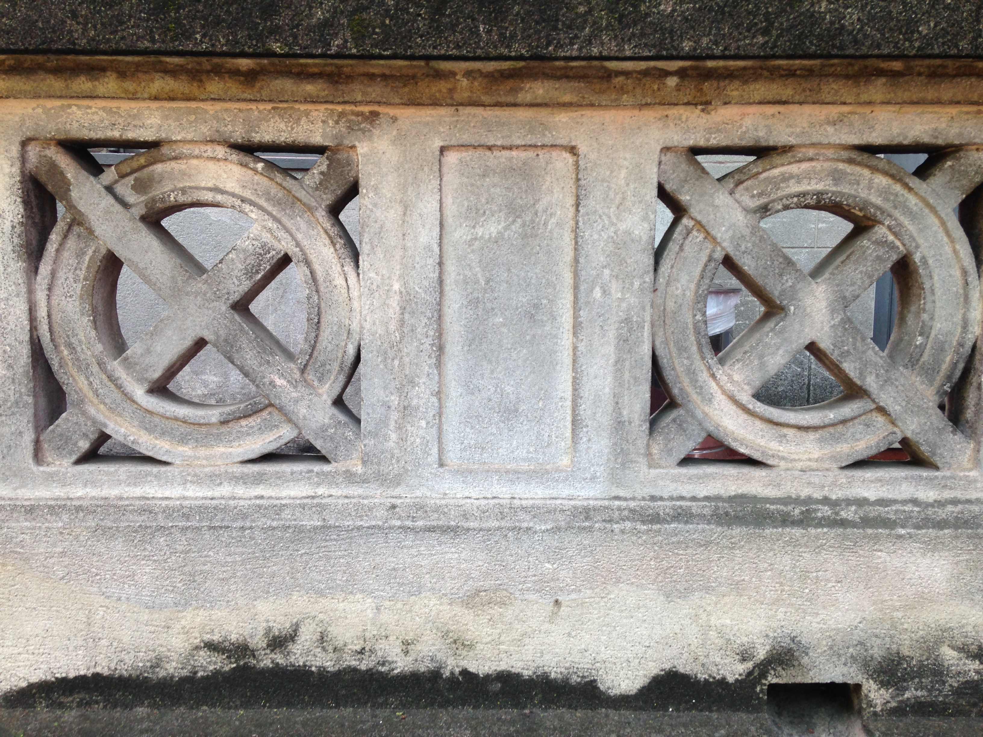 Detalhe arquitetônico da área de serviço Casa das Rosas.